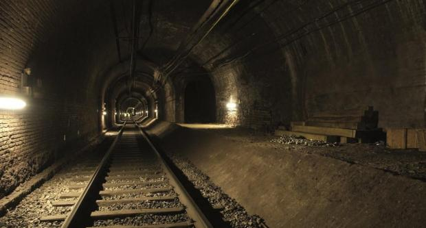 Antiga estació de Banc, a Barcelona.